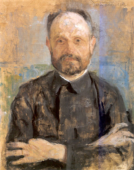 Wincenty Lutoslawski (1863–1954)